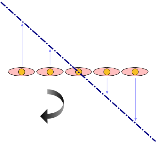 Illustration proposée dans le cadre d'un article sur le centre instantané de rotation. Création personnelle.